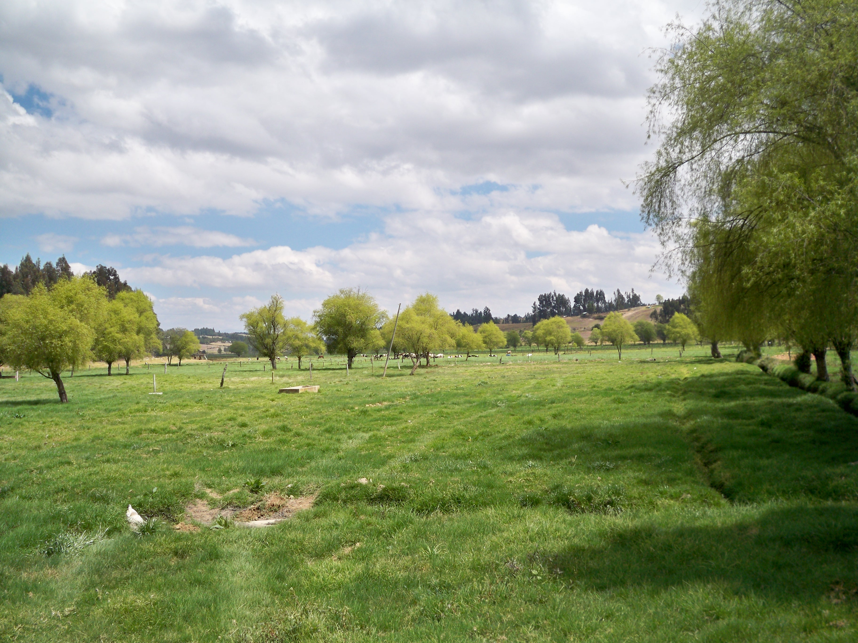 humedales del río chicamocha Lugar donde se muestra gran producción y comercializacion de leche debido a la alta humedad que posee la zona